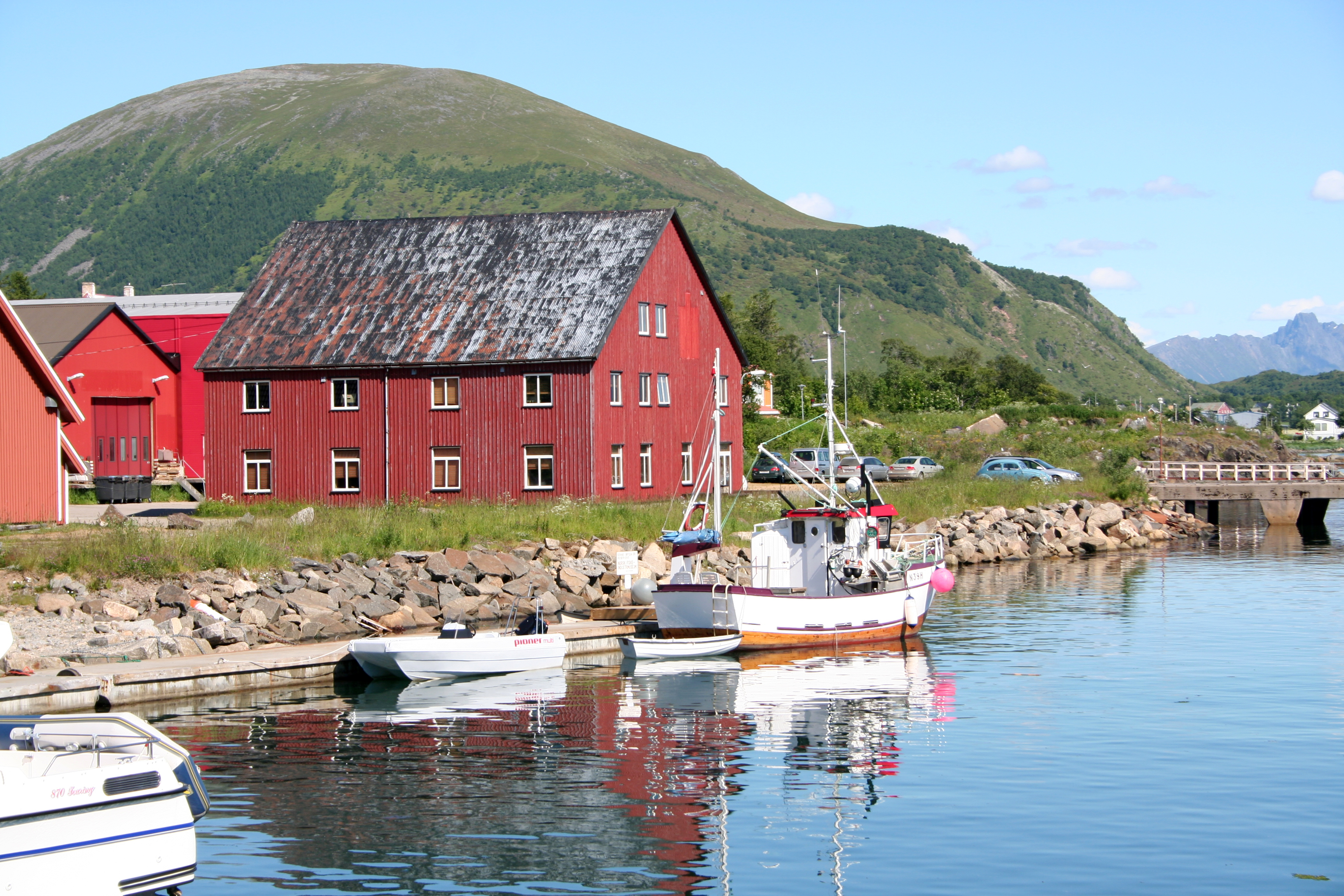 Melbu, Norway